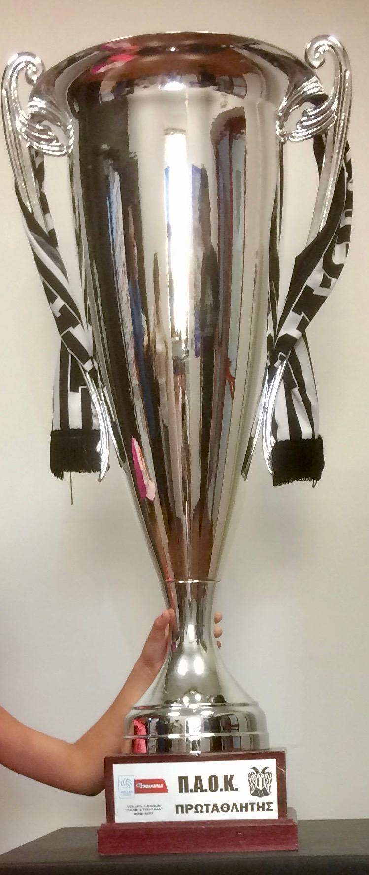 Der Meisterschaftspokal 2017 des PAOK VC mit dem PAOK Schaal